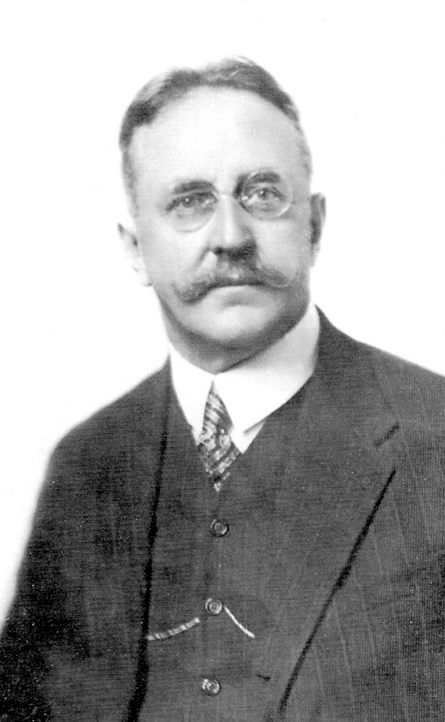 Franz Dinghofer - österreichischer Politiker. Unter anderem Reichsratsabgeordneter und Bürgermeister von Linz an der Donau 1907-1918.